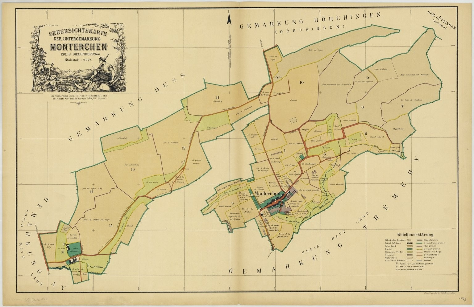 Uebersichtskarte der Untergemarkung Monterchen, Kreis Diedenhofen-Ost.